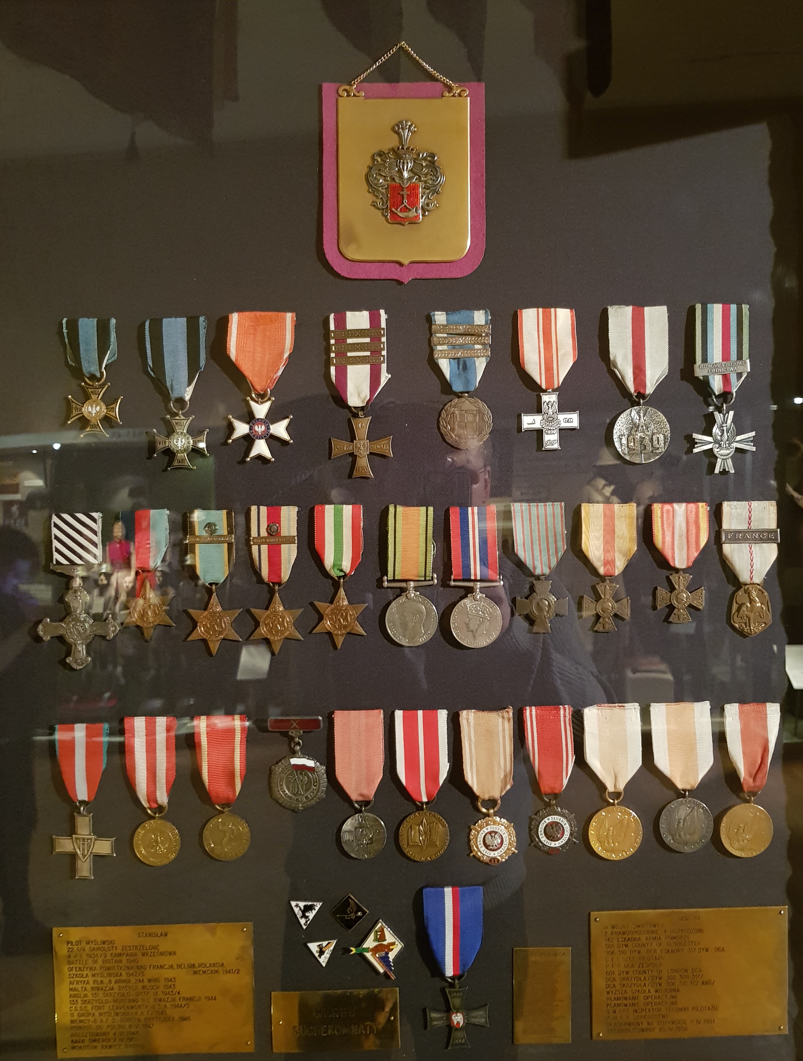 Odznaczenia gen. S. Skalskiego ze zbiorów w kolekcji Muzeum Wojska Polskiego w Warszawie